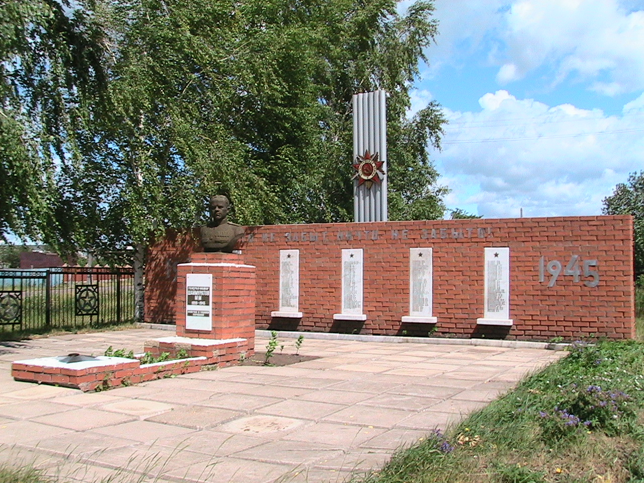 Фотография памятника генералу Шаймуратову в родном селе